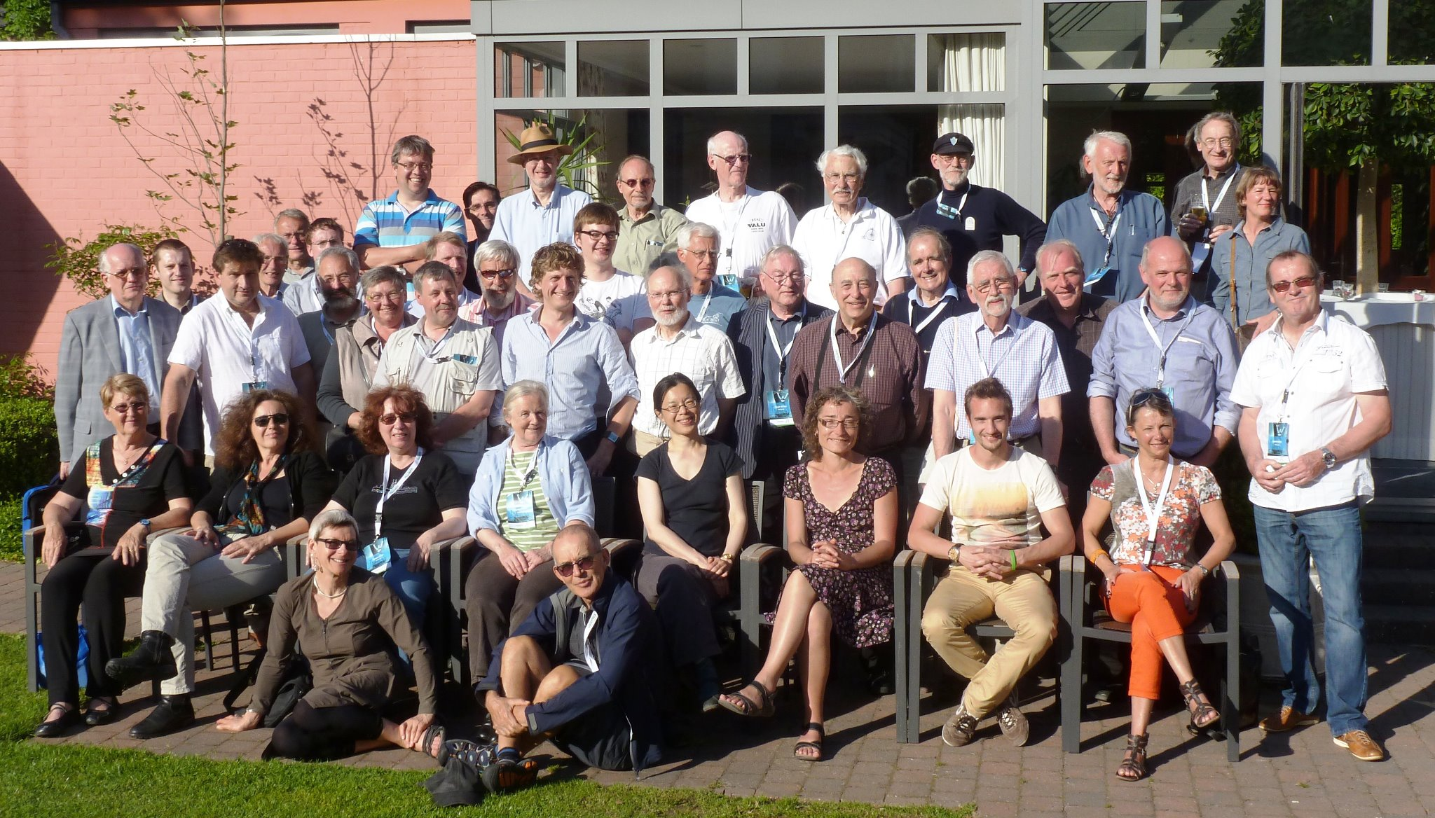 Die "International Cycling History Conference" 2012 in Roeselare, Belgien